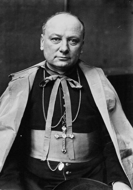 Portrait de Mgr Ginisty.